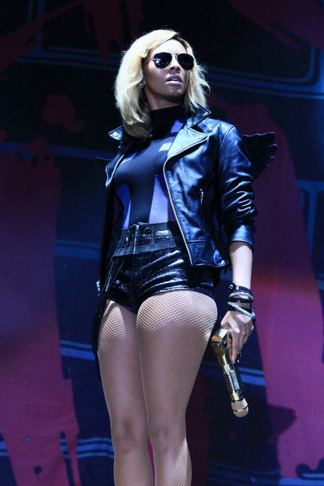 Description Photo prise par Fr@ncky Dicaprio © (d) 29 novembre 2011 à 04:48 (CET) (Abidjan) Date26 November 1990SourceIndiquez ici l'adresse web où a été trouvée l'image initialementAuthorFr@ncky Dicaprio © (d) 29 novembre 2011 à 04:47 (CET)Permission (Reusing this file) PD-Author Photo prise par Fr@ncky Dicaprio © (d) 29 novembre 2011 à 04:48 (CET) (Abidjan)